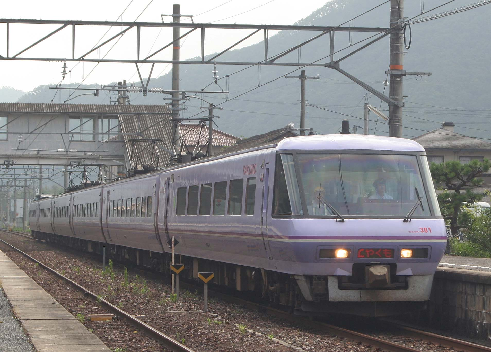 JR西日本381系特急やくも クロ380形 パノラマグリーン車（旧「スーパーやくも」塗色） 美袋駅にて